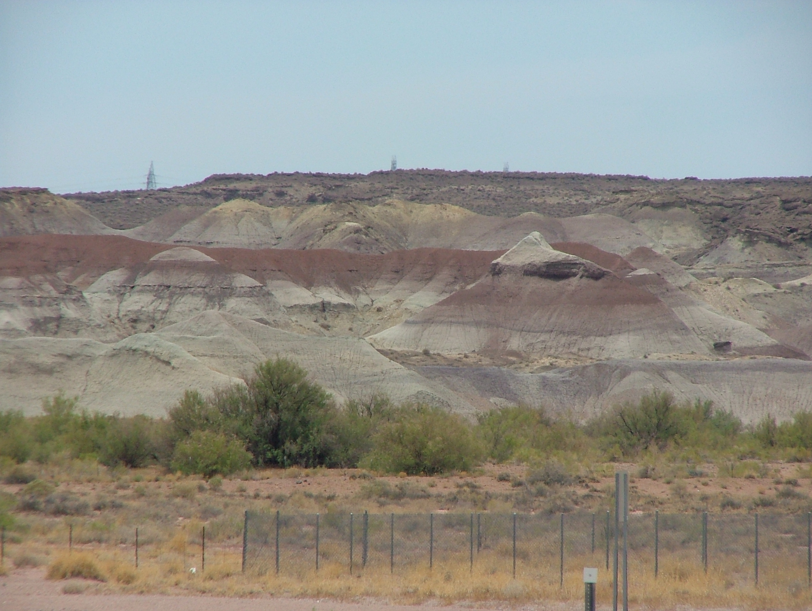 Painted Desert, Arizona